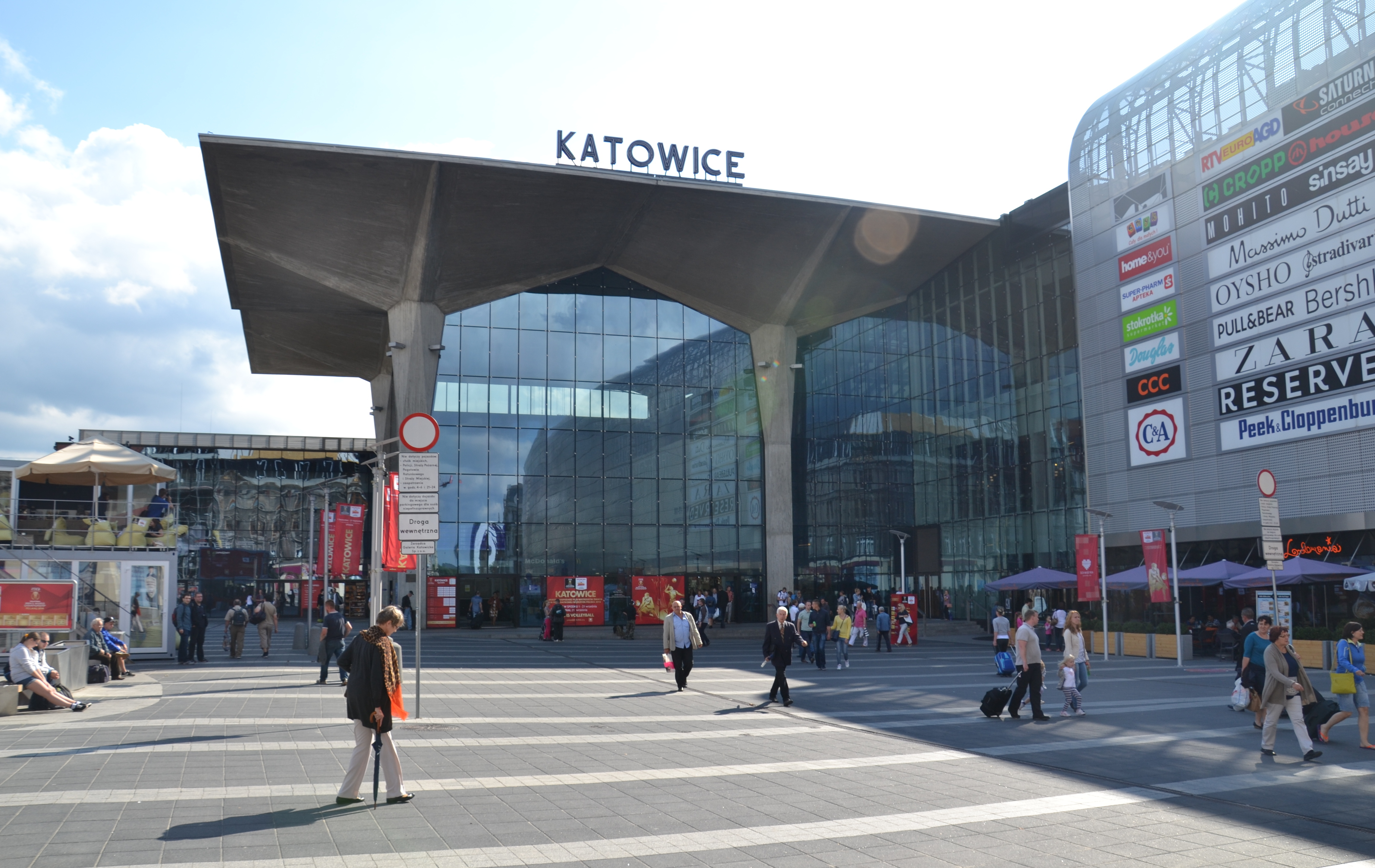 Charakterystyczne zrekonstruowane kielichy podtrzymujące strop dworca w Katowicach